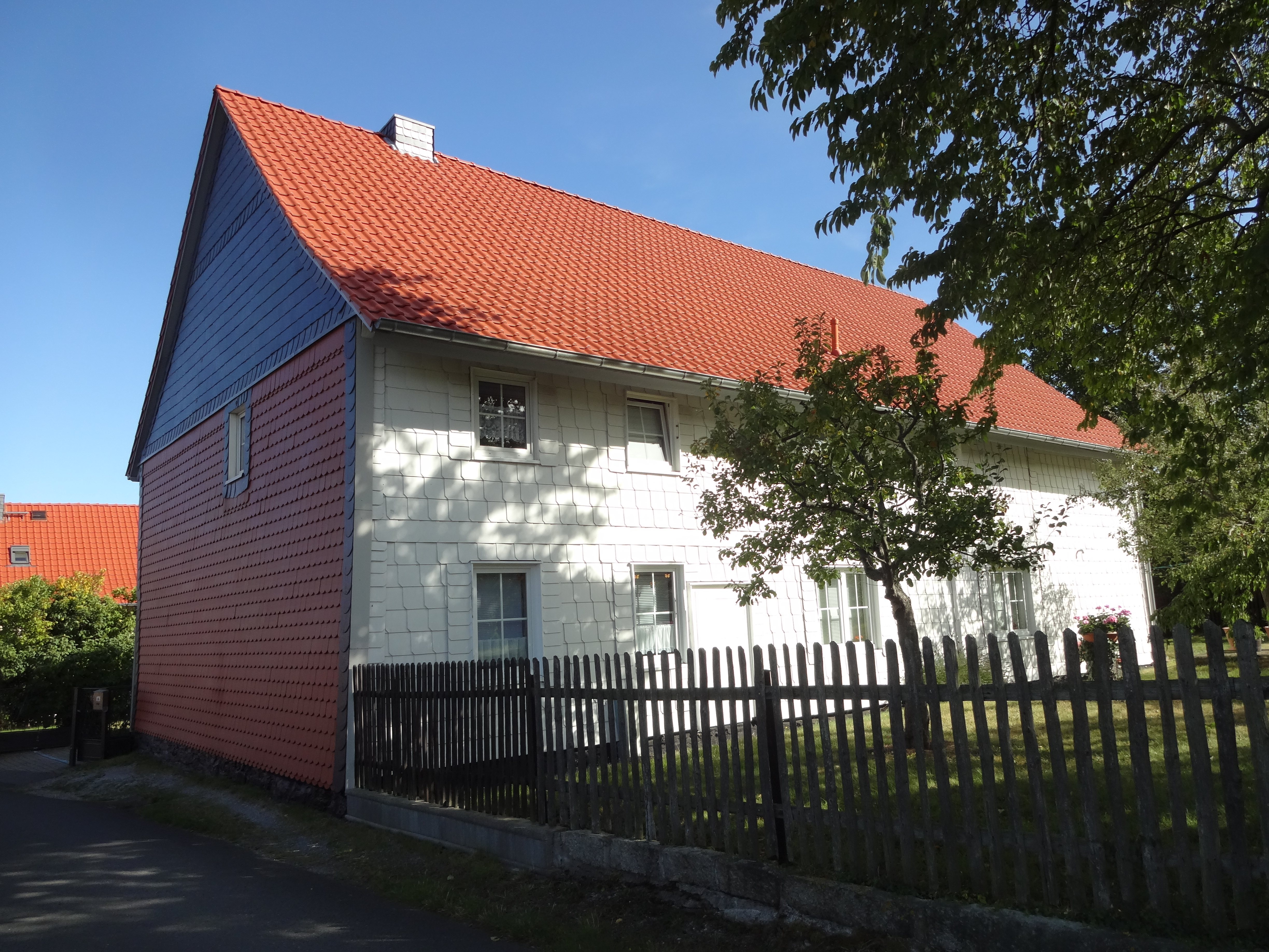 denkmalgeschütztes Bauernhaus in der Schmiedestraße 16 in Drübeck